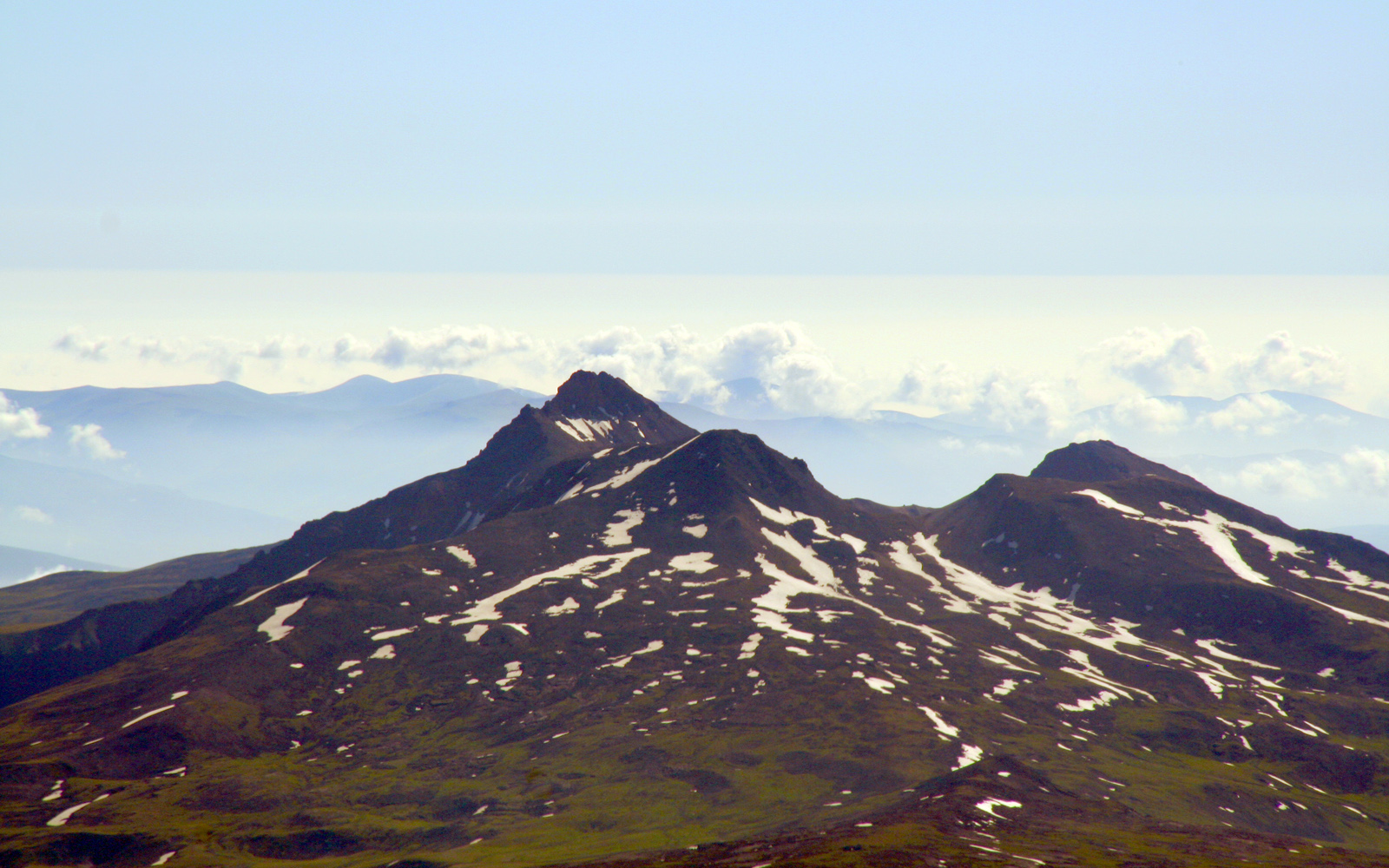 Mont Arakats, les 4 sommets